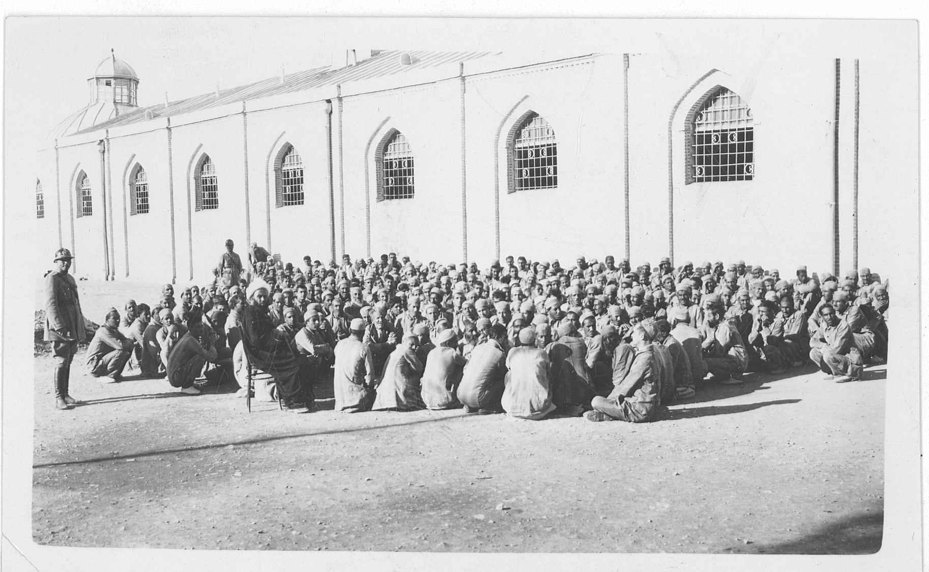 زندان قصر